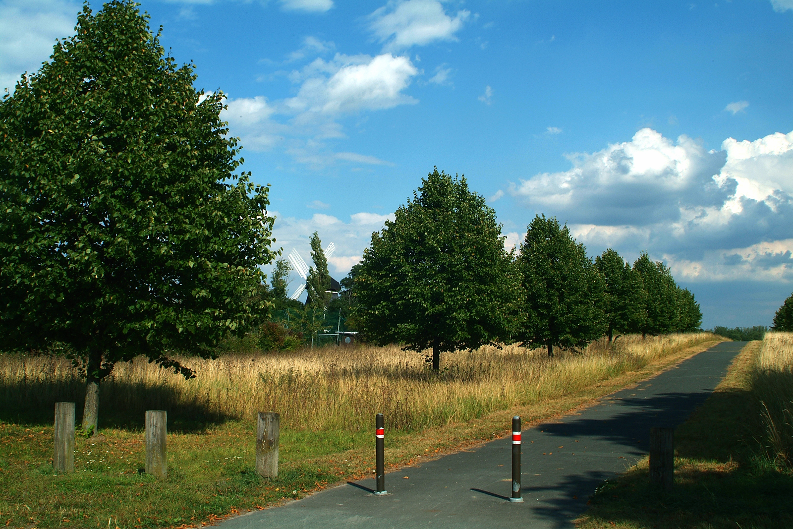 Anstelle des ehemaligen Schießstandes auf dem Kronsberg in Anderten führt heute ein asphaltierter Fahrradweg durch die Landschaft nahe der Holländerwindmühle ...